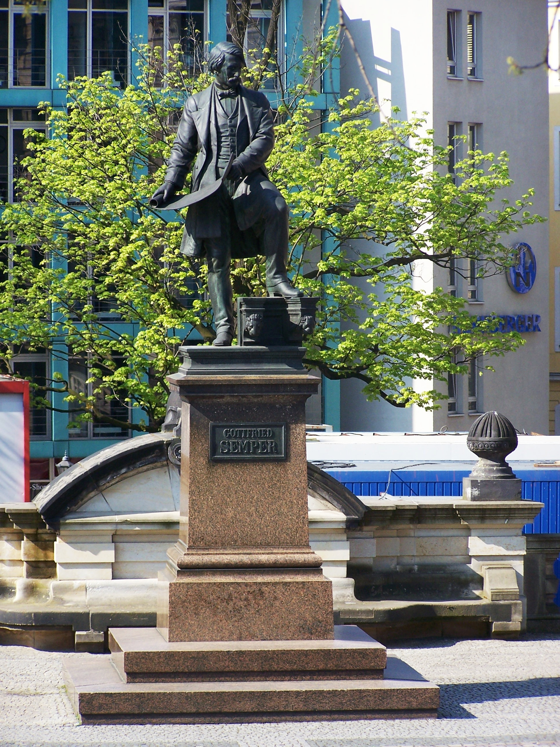 Denkmal für Gottfried Semper auf der Brühlschen Terrasse in Dresden; Künstler: Johannes Schilling